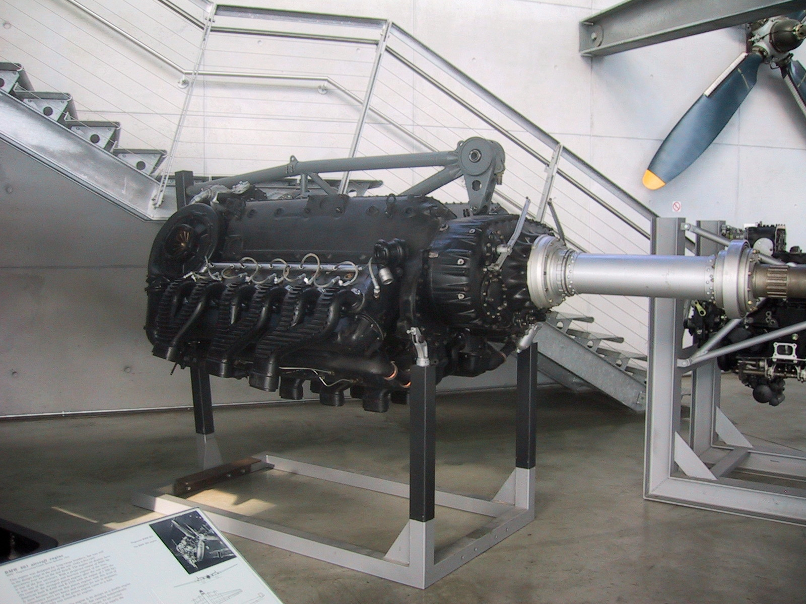 Daimler Benz DB 610 Aircraft Engine, Deutsches Museum, Munich